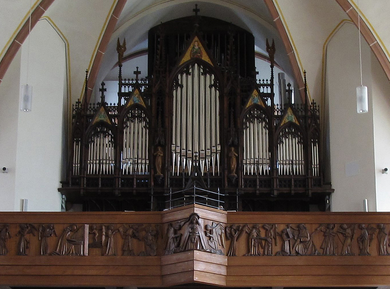 Das Orgelprospekt der Späth-Orgel in der katholischen Pfarrkirche St. Josef in St. Ingbert, Saarland